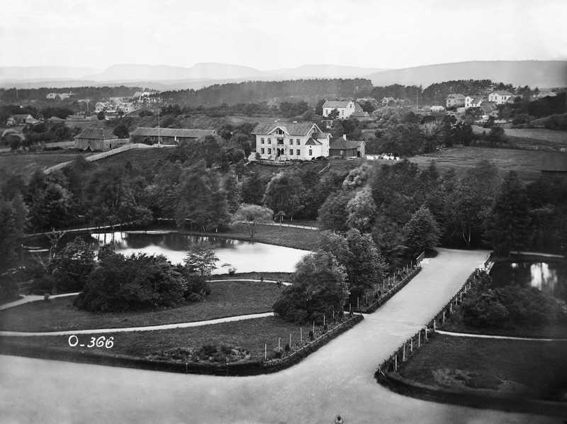 Utsikt fra Slottet mot Incognito løkke, utsikt, park, dam, kulturlandskap, Incognito løkke, bolighus, uthus, hager.